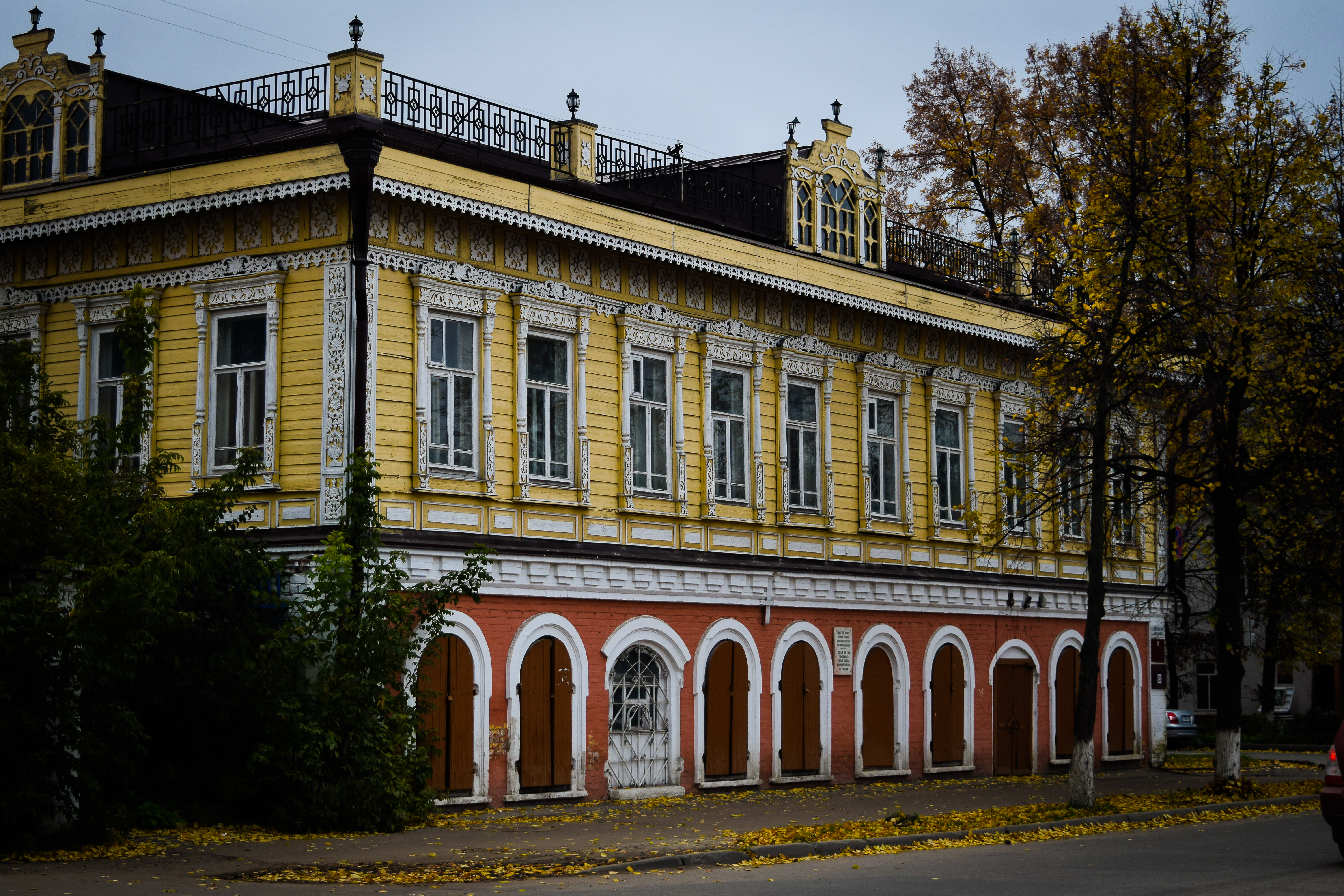 Дом Наумова: улица Советская, 104, Йошкар-Ола, Марий Эл